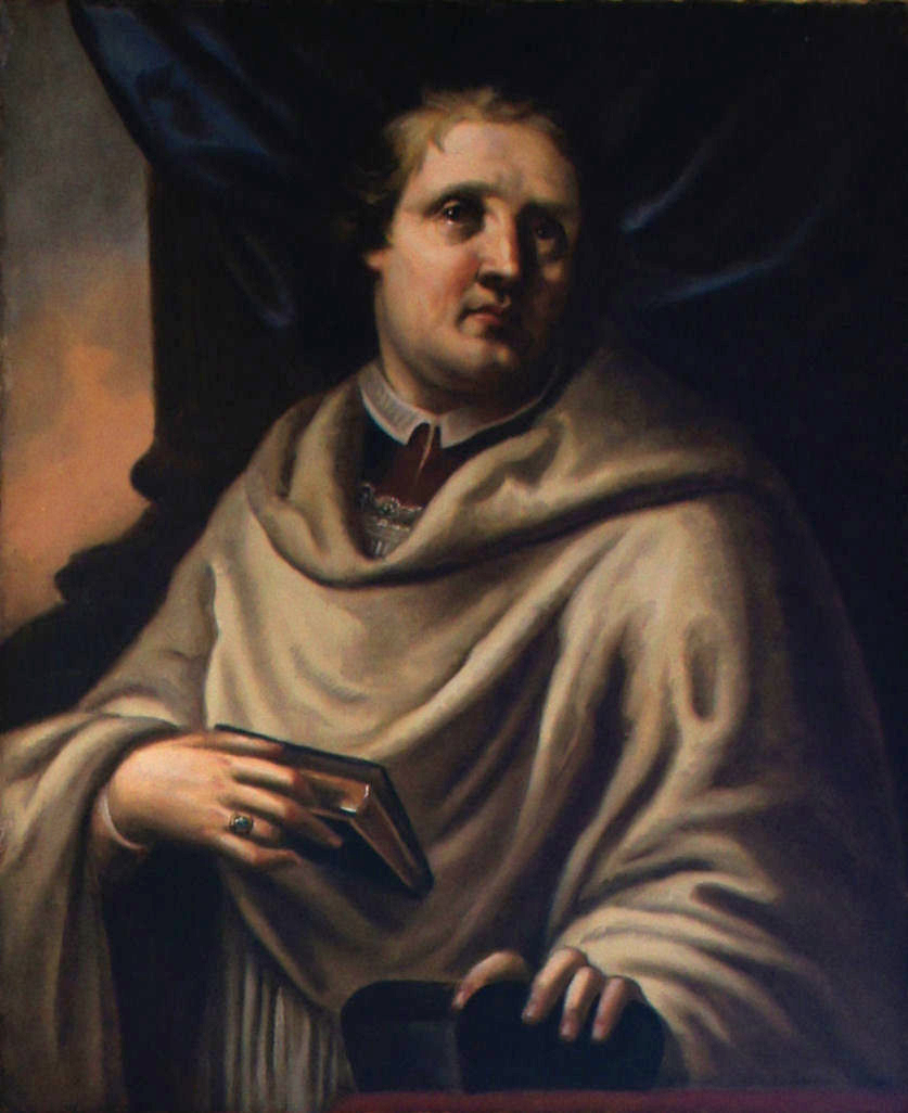 Porträtgemälde von Heinrich II. Schlick, Fürstbischof von Freising, im Fürstengang zwischen Fürstbischöflicher Residenz und Freisinger Dom.